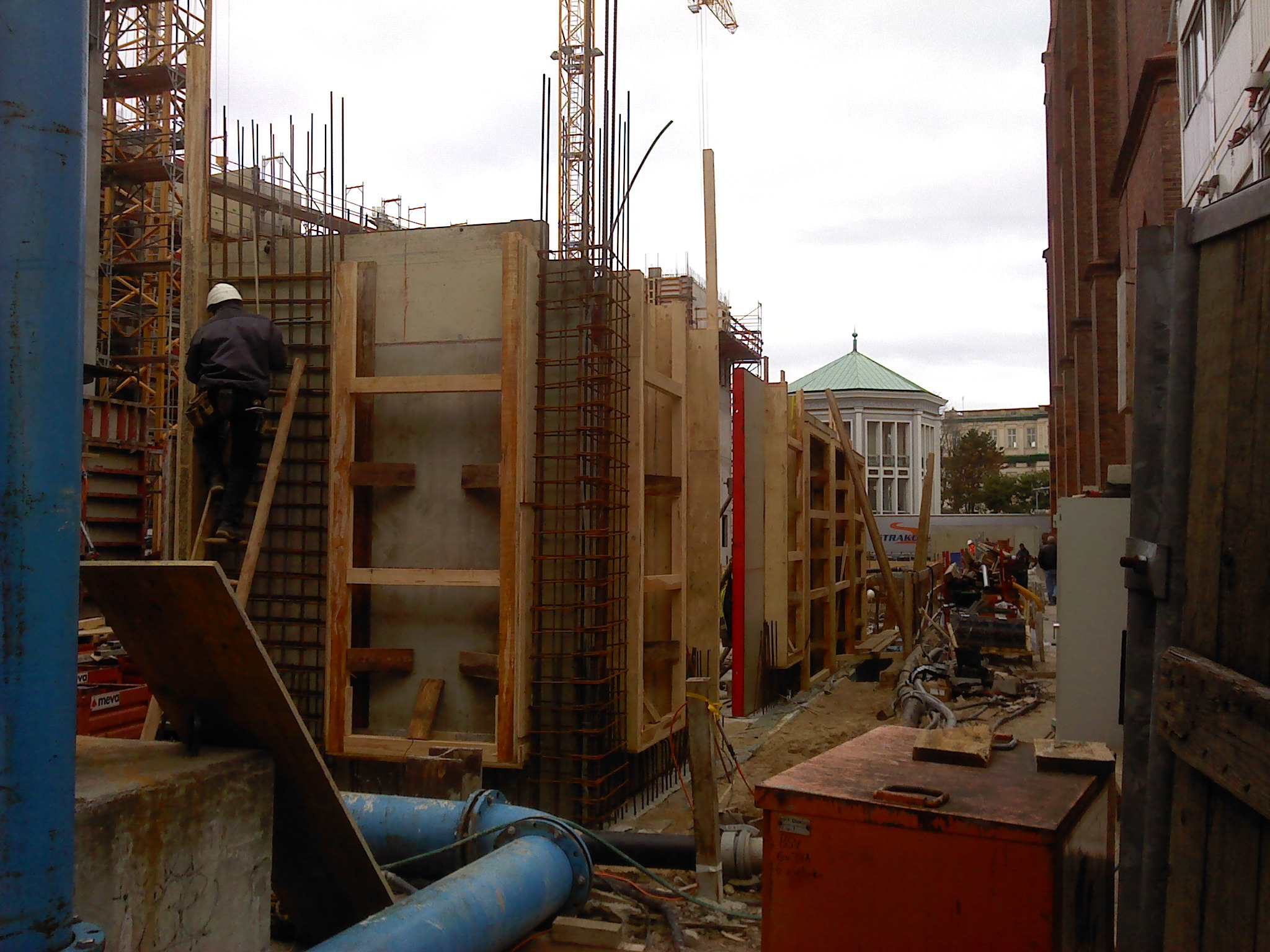 Falkoniergasse neu